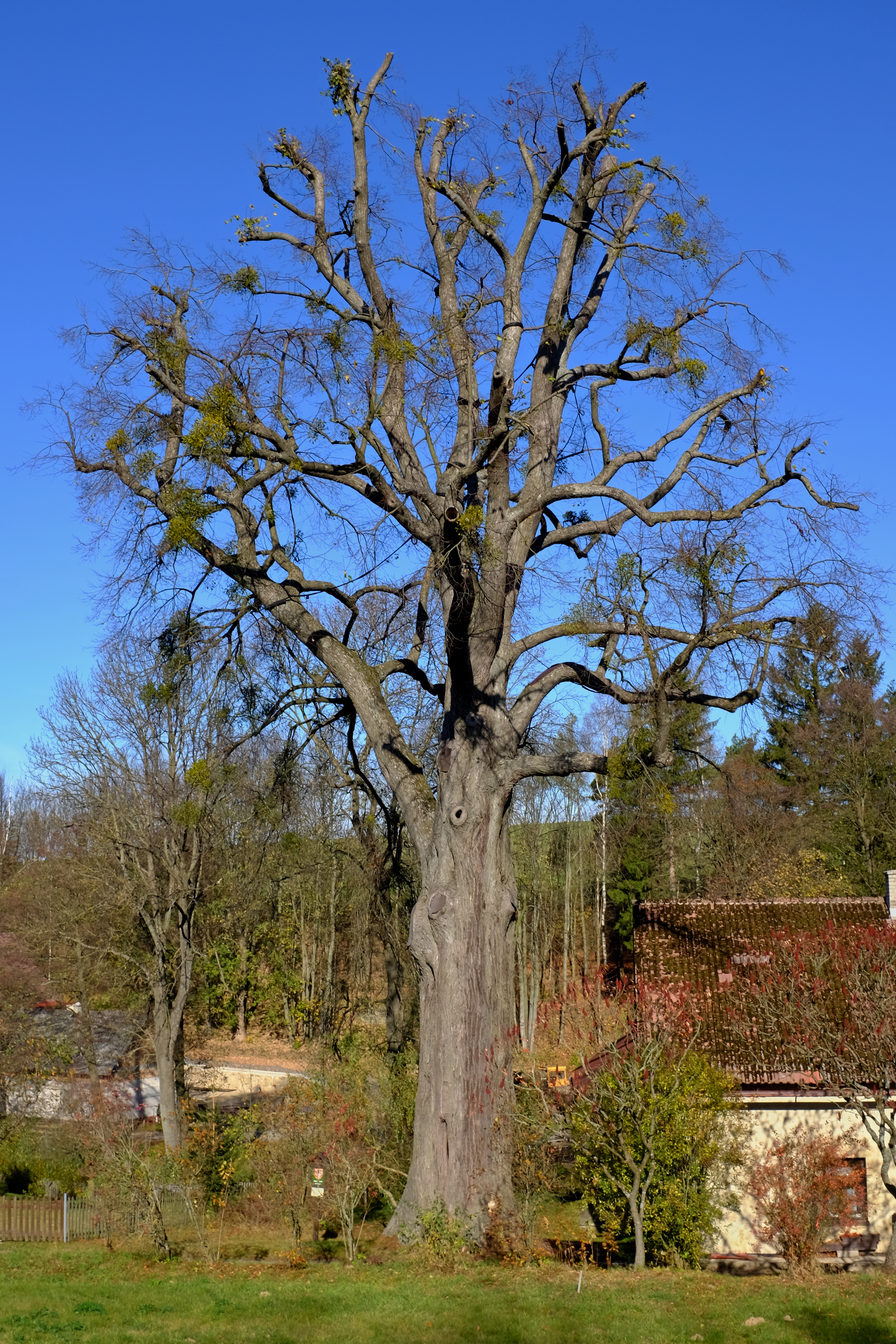 Památný strom - Mlynářova lípa - Pustá Kamenice, okres Svitavy